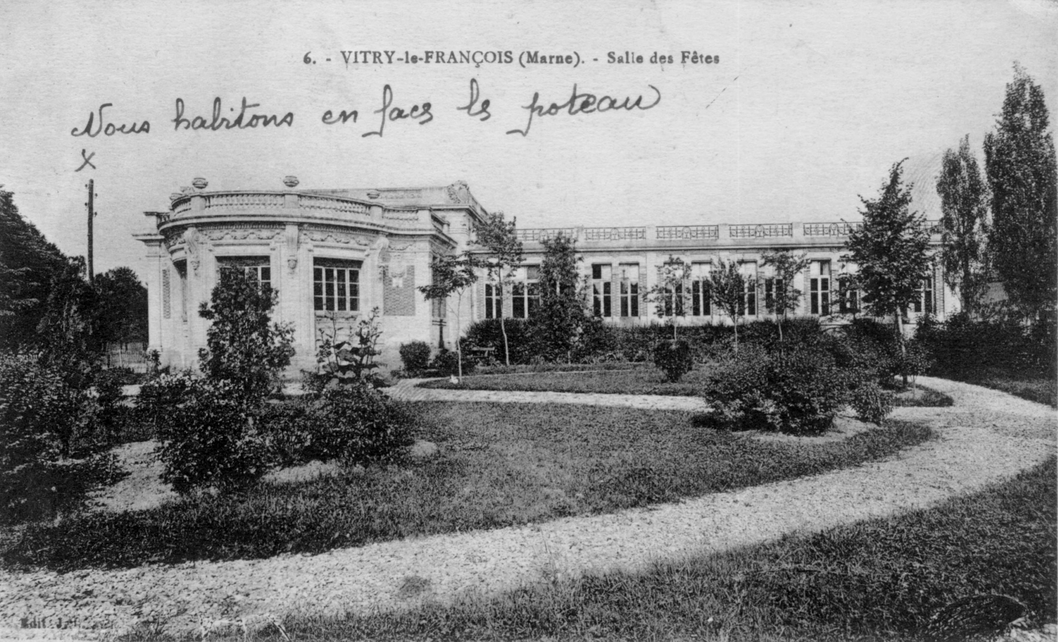 Vitry Le François. Salle des fêtes (J. Bourgogne, éditeur à Château-Thierry)